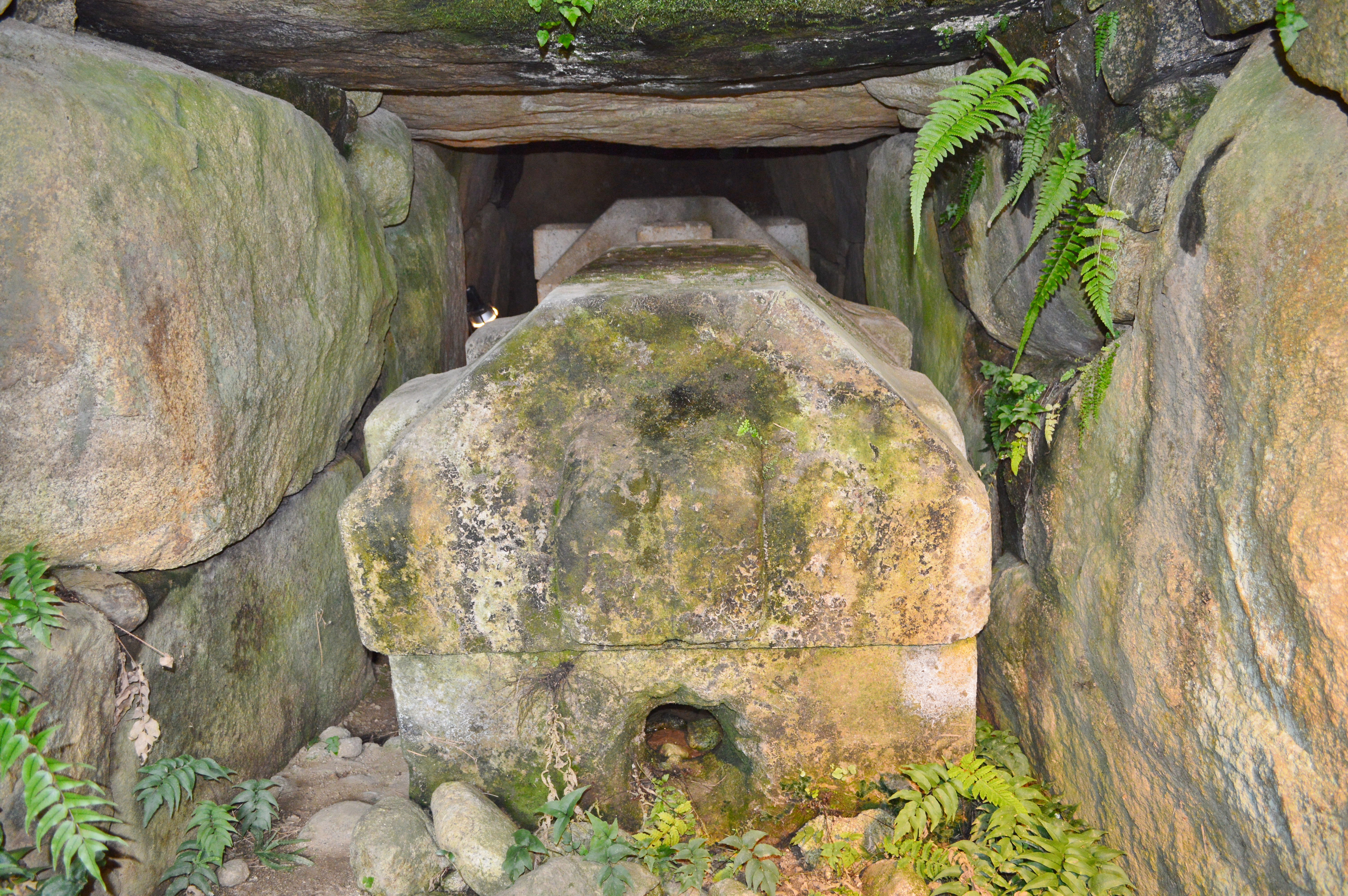 金山古墳 石室羨道